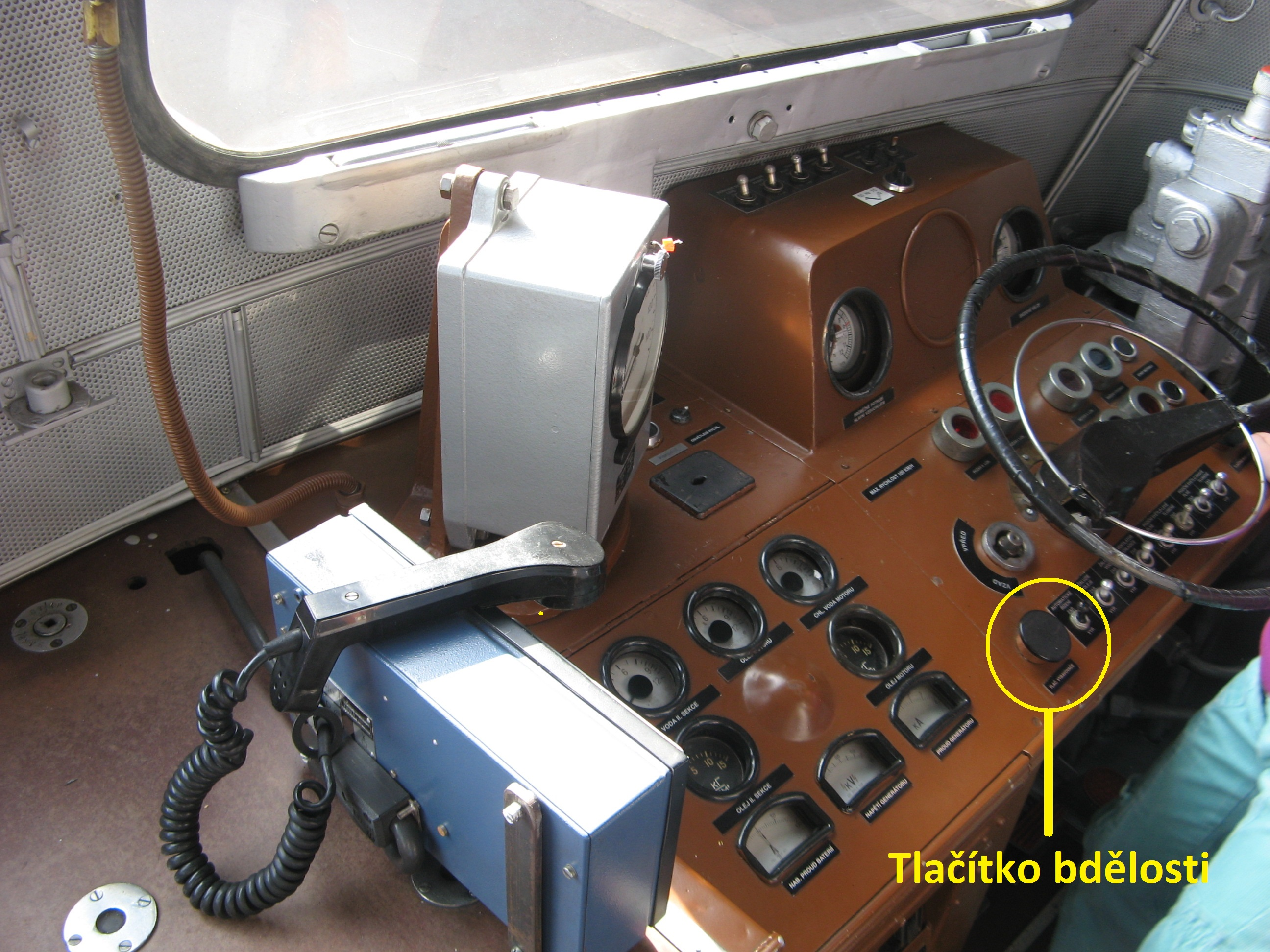 Kabina lokomotivy s označením tlačítka bdělosti.